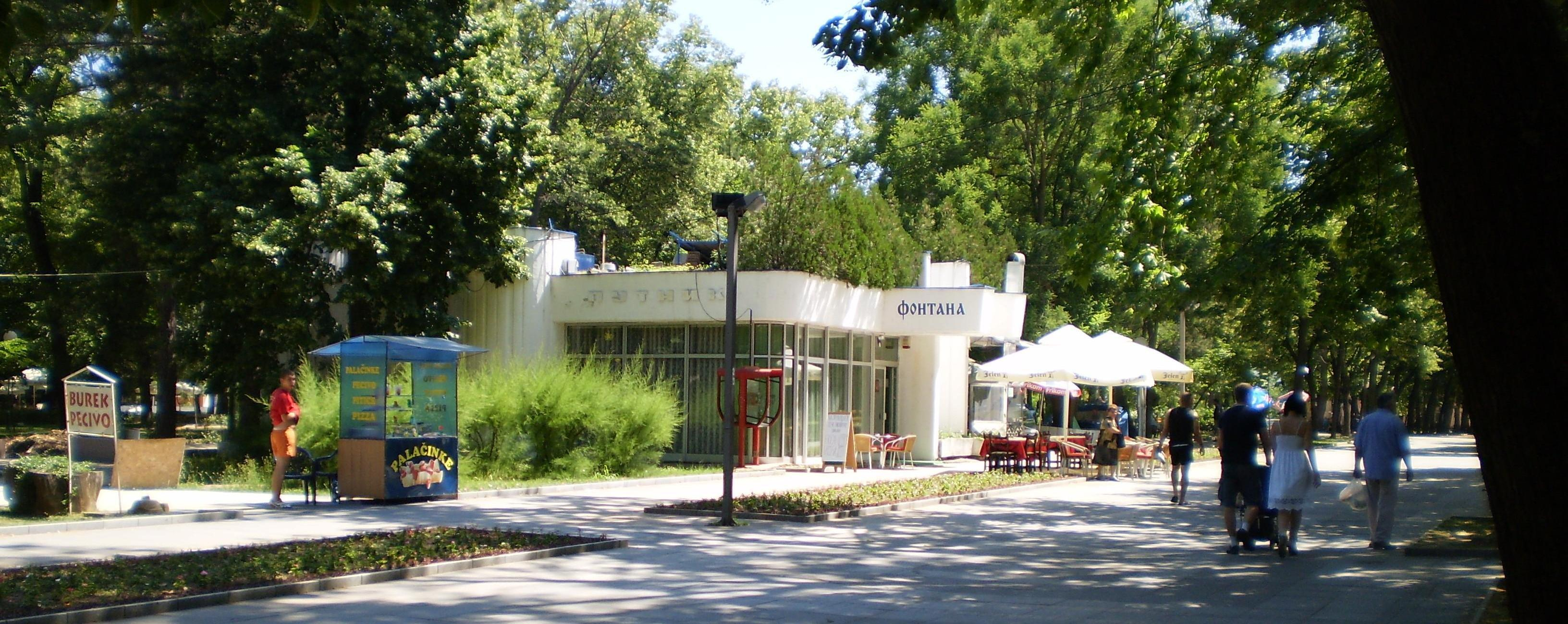 Šetalište i turistička agencija u glavnom parku Niške Banje. Autor: dr Milorad Dimić, Niš, Srbija. 21. jun 2012.